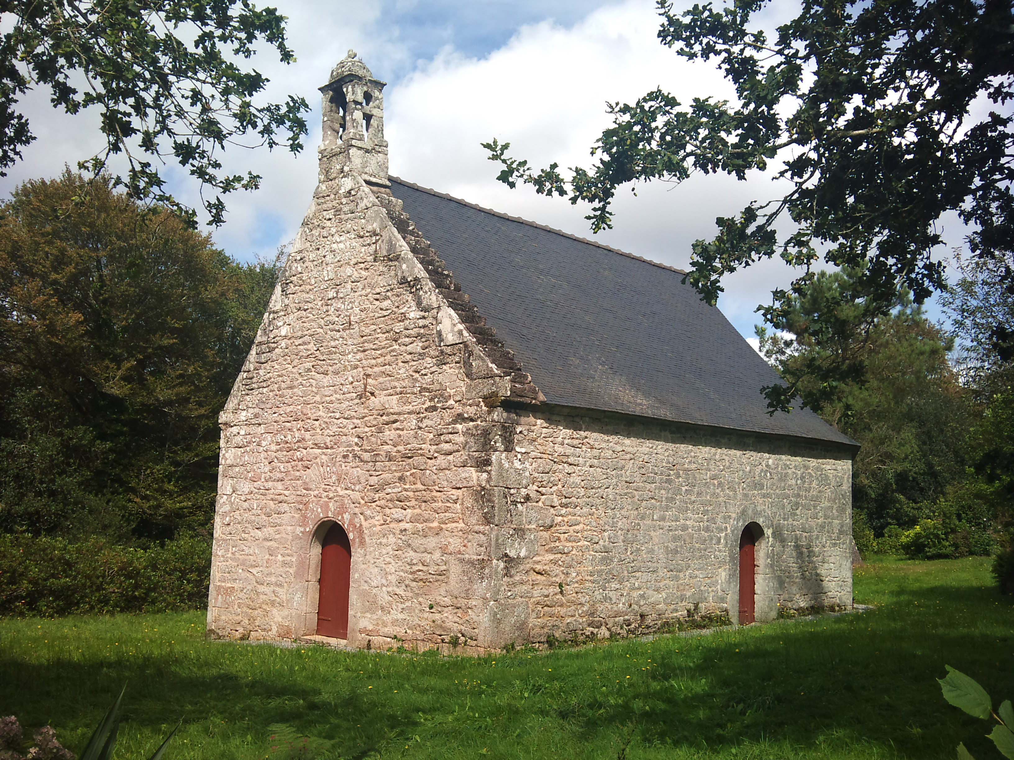 Chapelle Saint-Gwenaël, selon les panneaux installés sur place (mais Saint-Guénaël sur les carte de l'IGN, et Saint-Guenhaël dans les bases du ministère de la culture) au lieu-dit le Cosquer Saint-Gwenaël, dans la commune de Guiscriff (Morbihan), France. Fermée au long de l'année, un pardon y est célébré à la mi-juillet. Elle est habituellement datée du 17th century date QS:P,+1650-00-00T00:00:00Z/7, même si certaines sources indiquent le 16th century date QS:P,+1550-00-00T00:00:00Z/7.Note : on ne doit pas la confondre avec la Chapelle Saint-Gwenaël de Lanester (Morbihan).